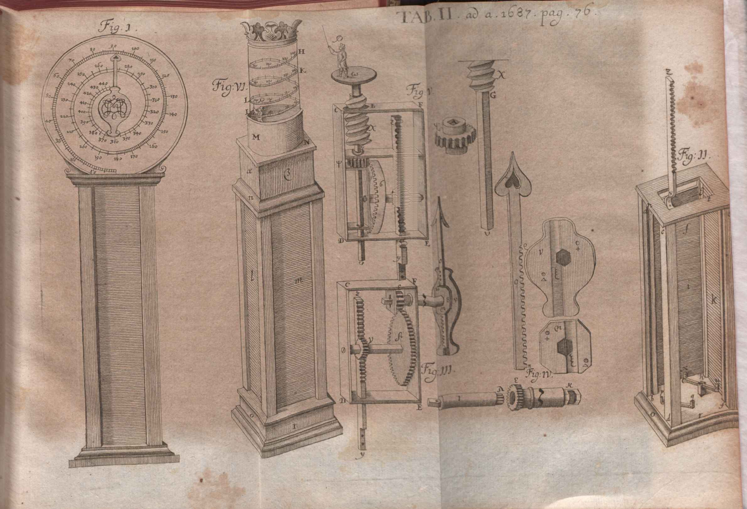 Illustration